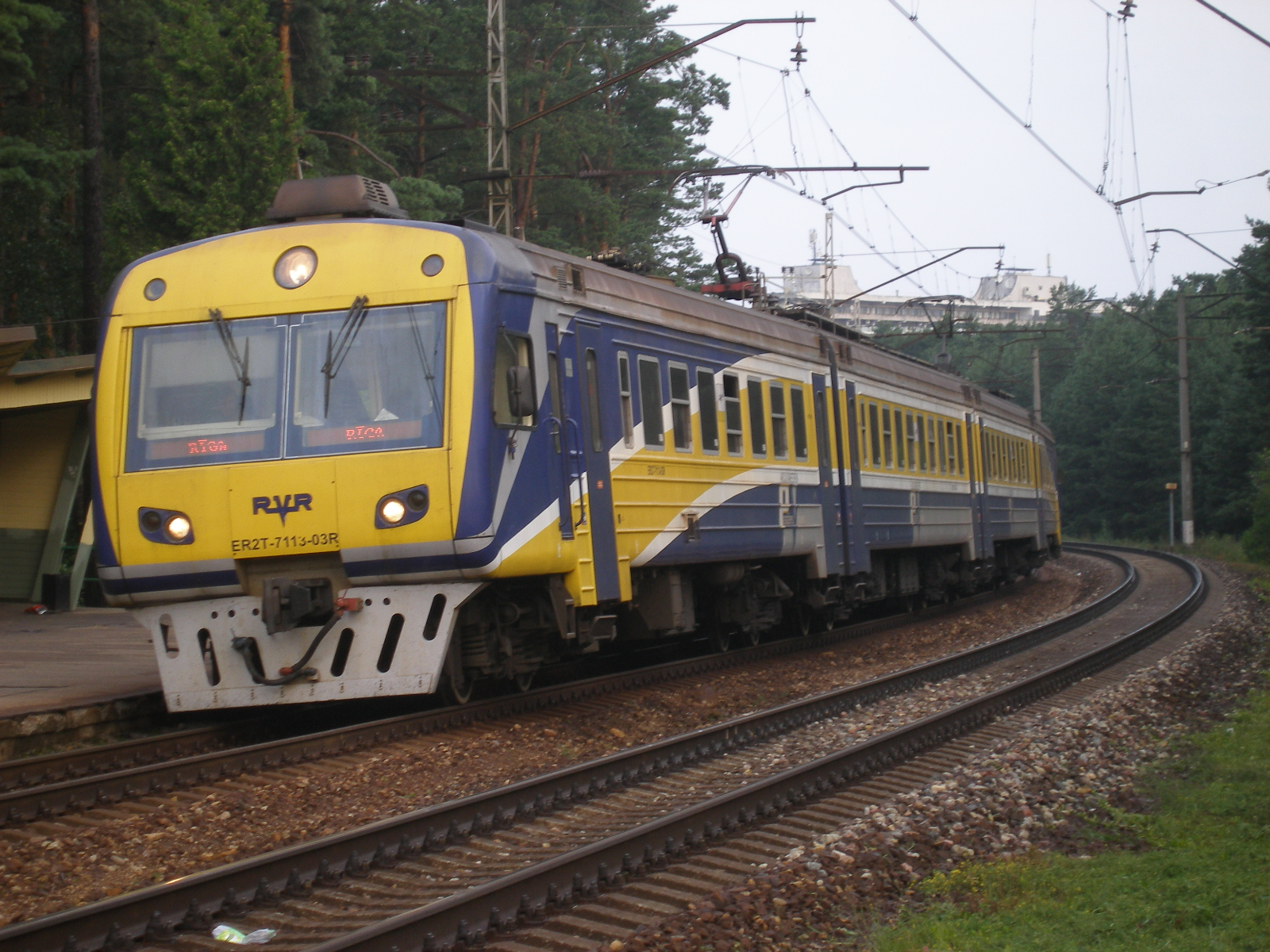 Elektrovilciens ER2T-7113 Lielupes stacijā.